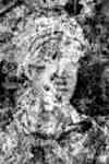 Świętopełk Wielki